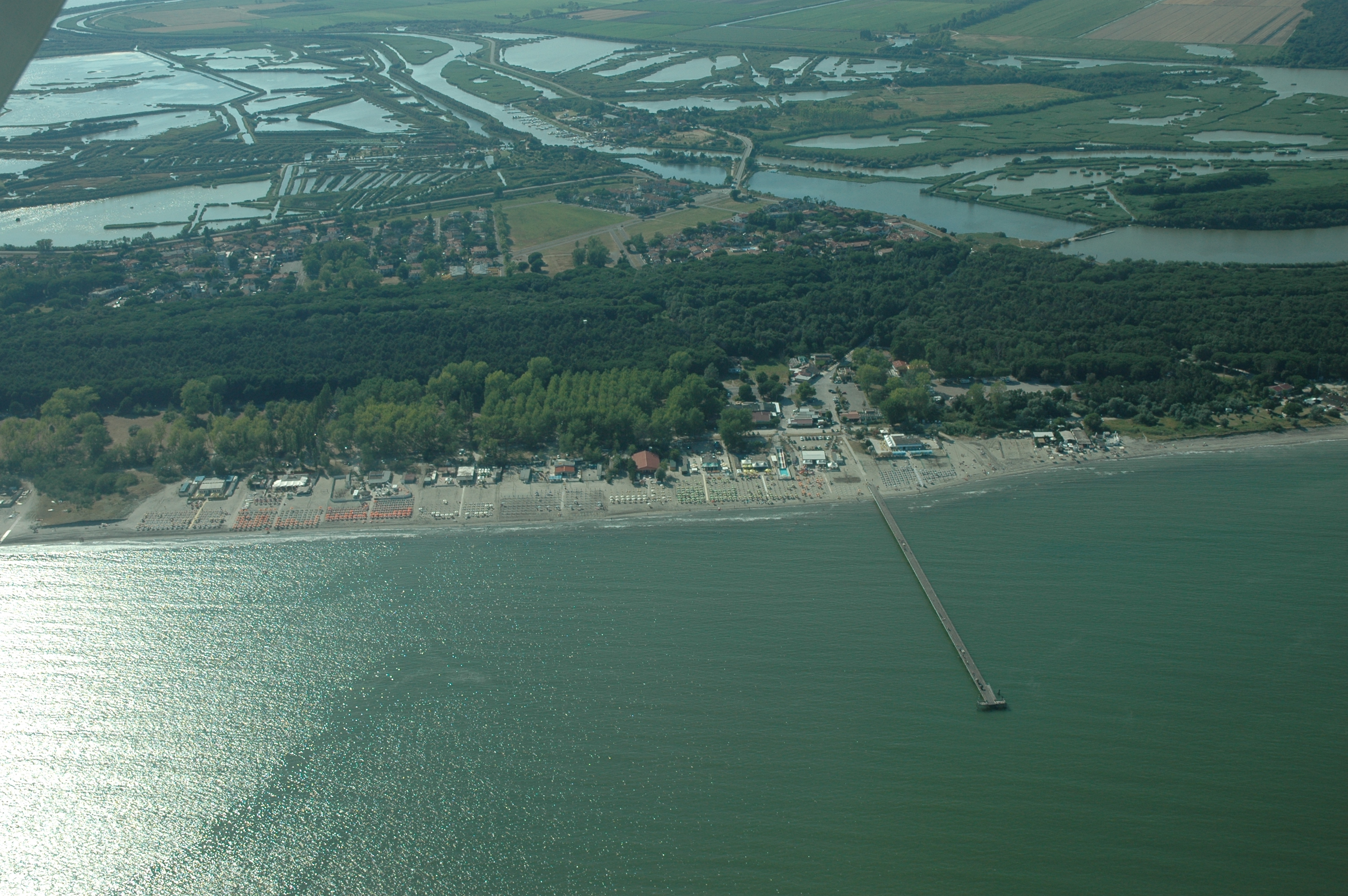 Pontile del lido di Volano dall'aereo This is a photo of a monument which is part of cultural heritage of Italy.